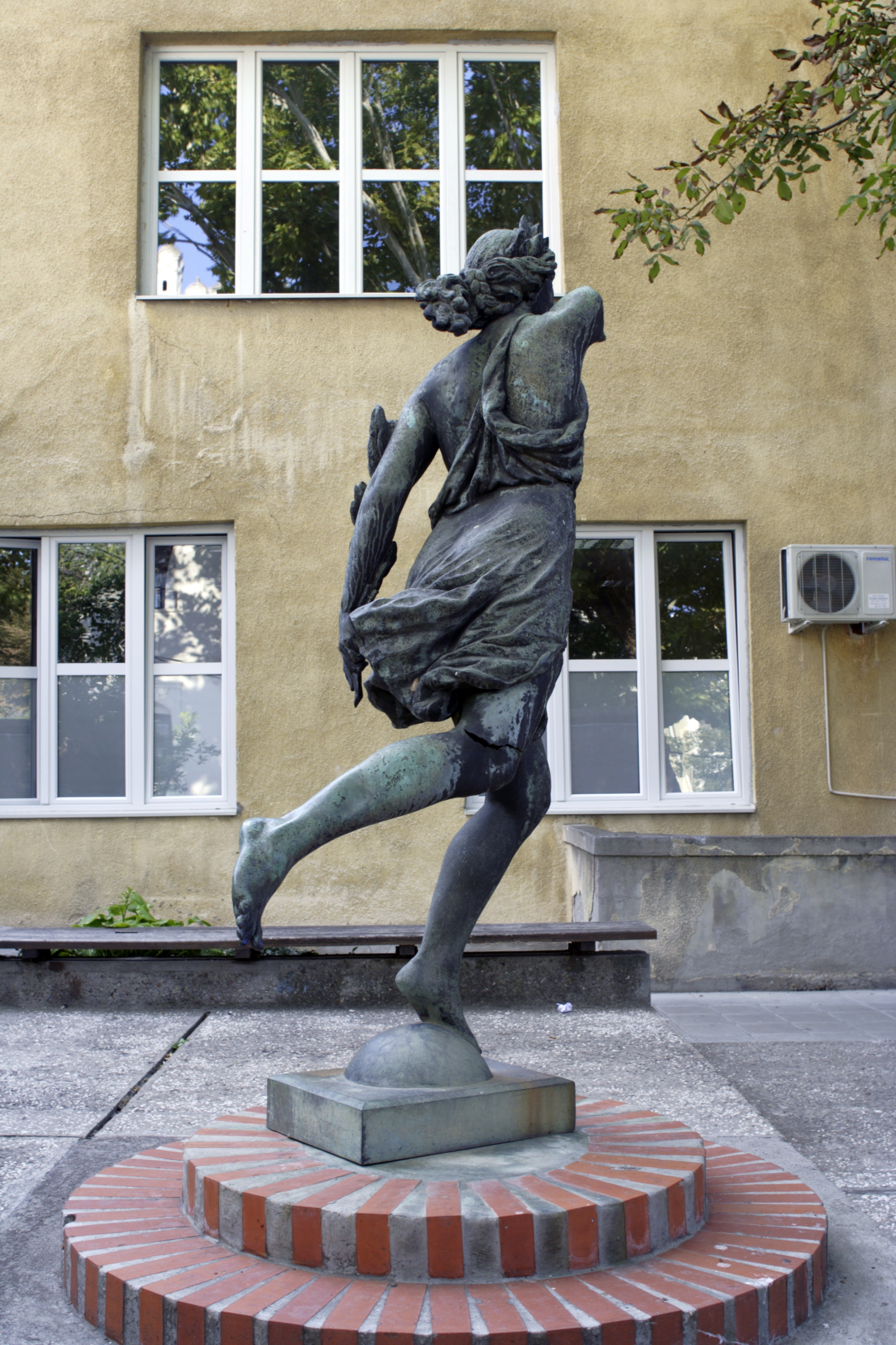 Зграда уметничке школе